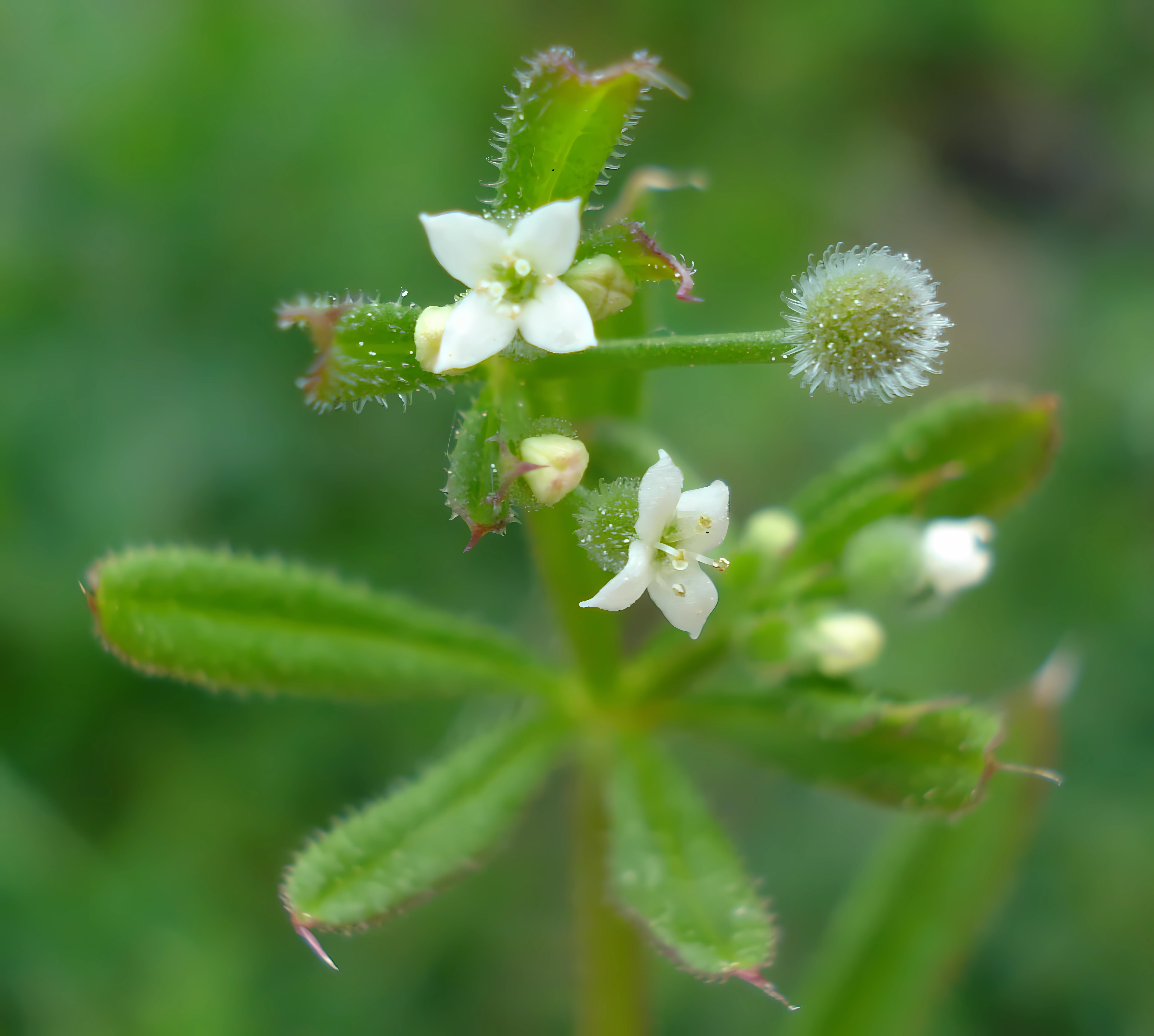 Galium aparine (Unterfranken, Germany)